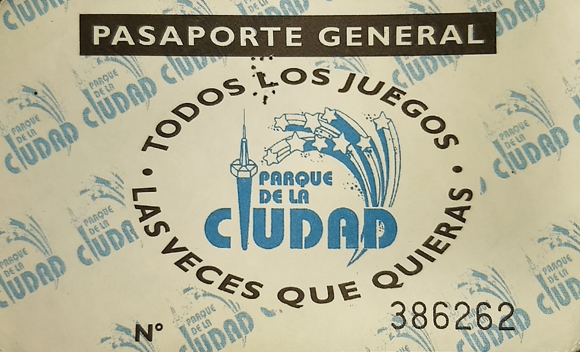 Pasaporte para la entrada al Parque de la Ciudad de Buenos Aires, Argentina. Entrada de fines de los 90s cuando el Parque aún estaba abierto al publico con sus juegos en funcionamiento.